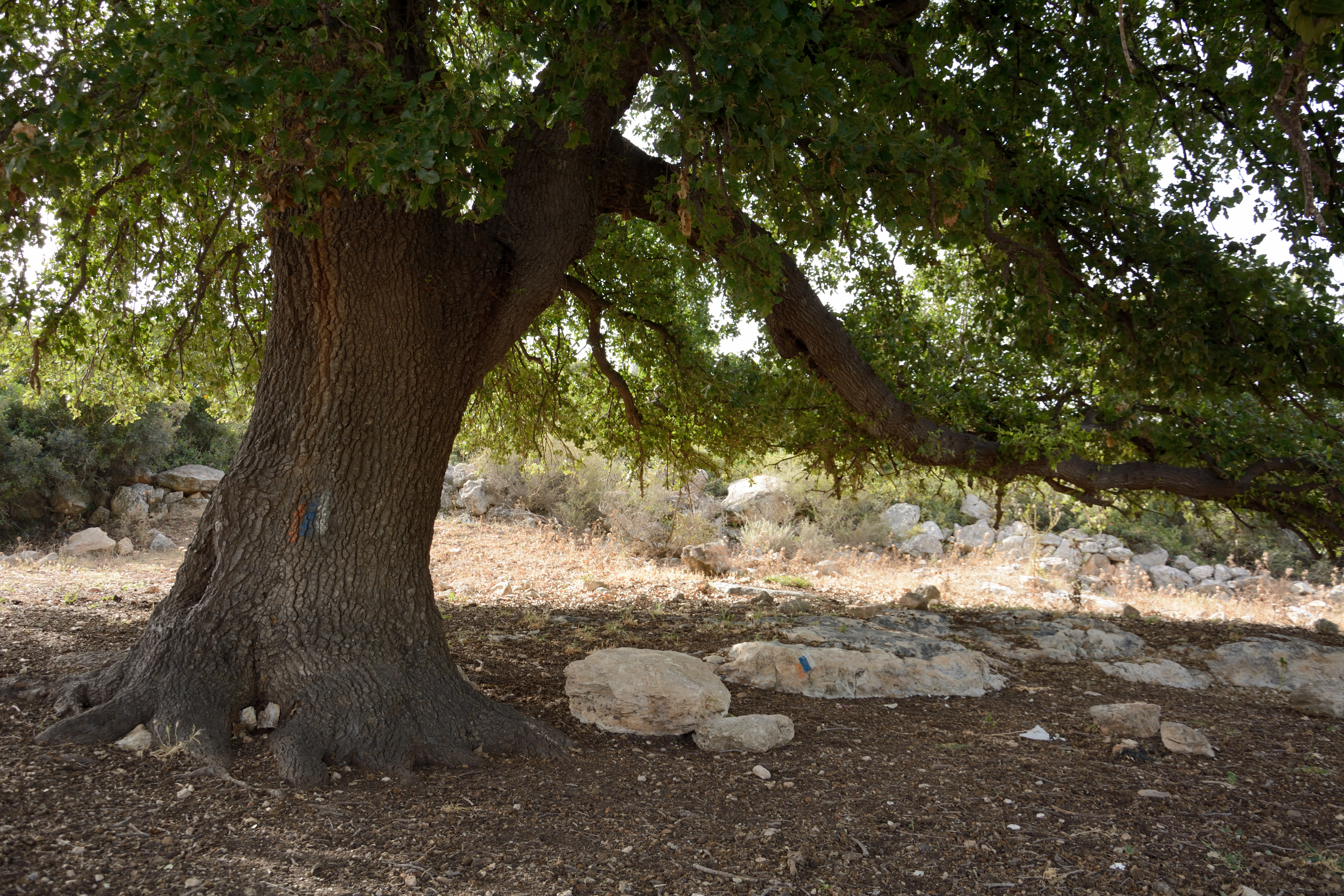 Этот большой дуб растет на поляне возле поселения Рехасим, на линии Израильского национального тракта.